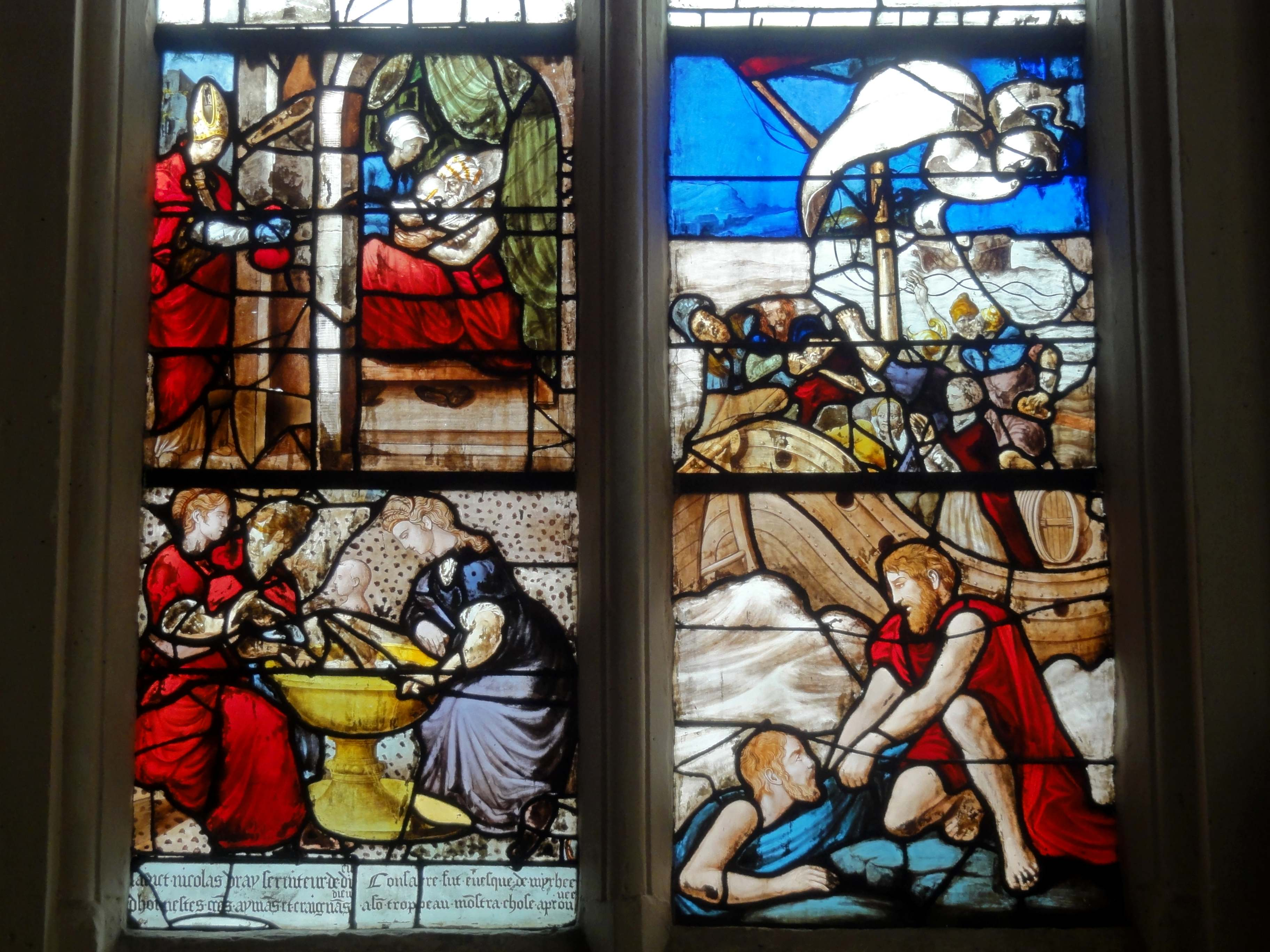 Verrière n° 5 dite de Saint-Nicolas.